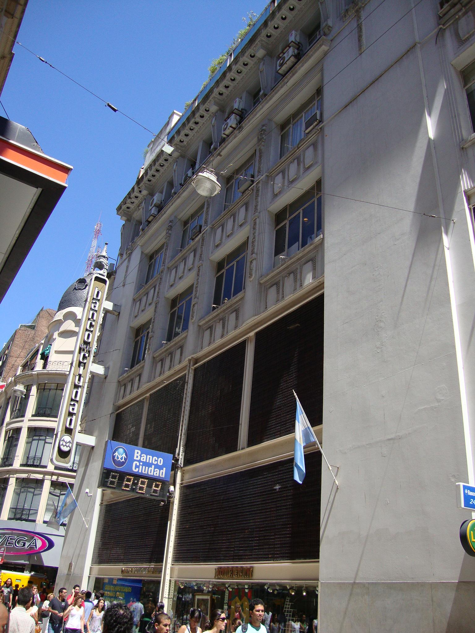 Vista desde la calle Florida de la casa matriz del Banco de la Ciudad de Buenos Aires, en la esquina de la calle Sarmiento.